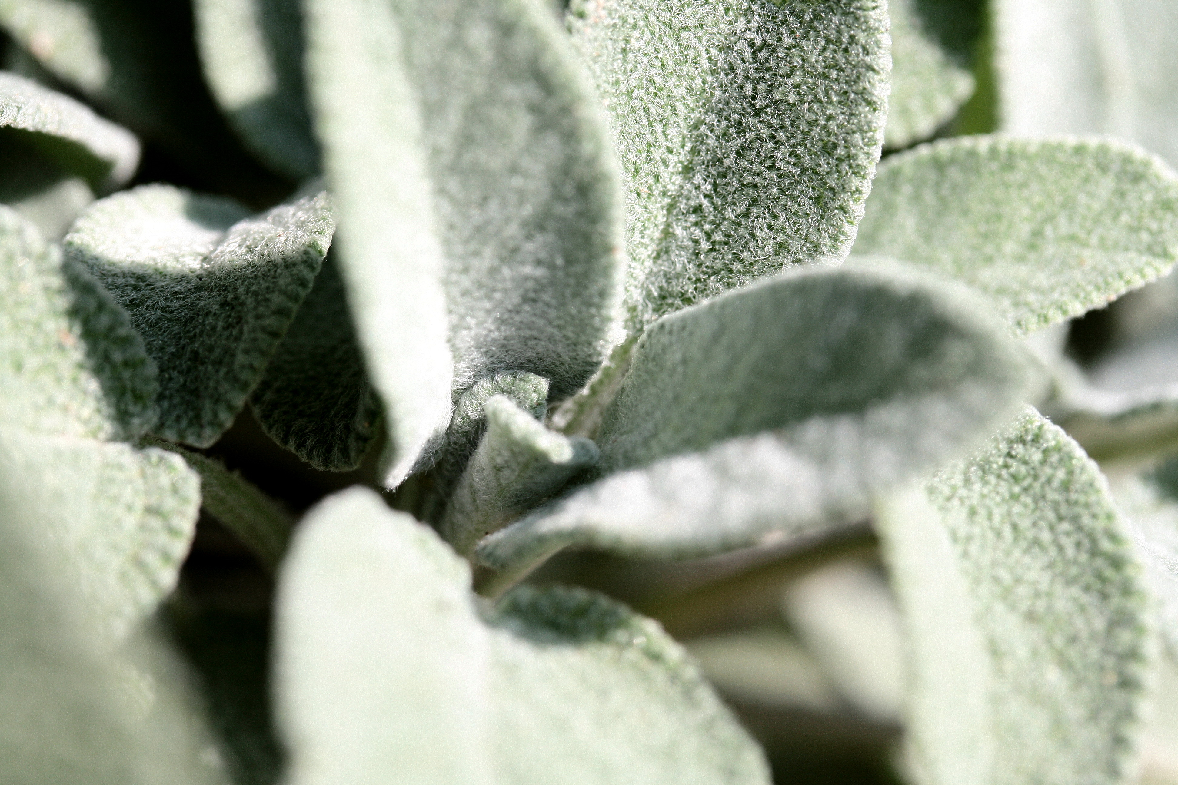 Macroaufnahme von frischen Salbeiblättern (Salvia spec.)